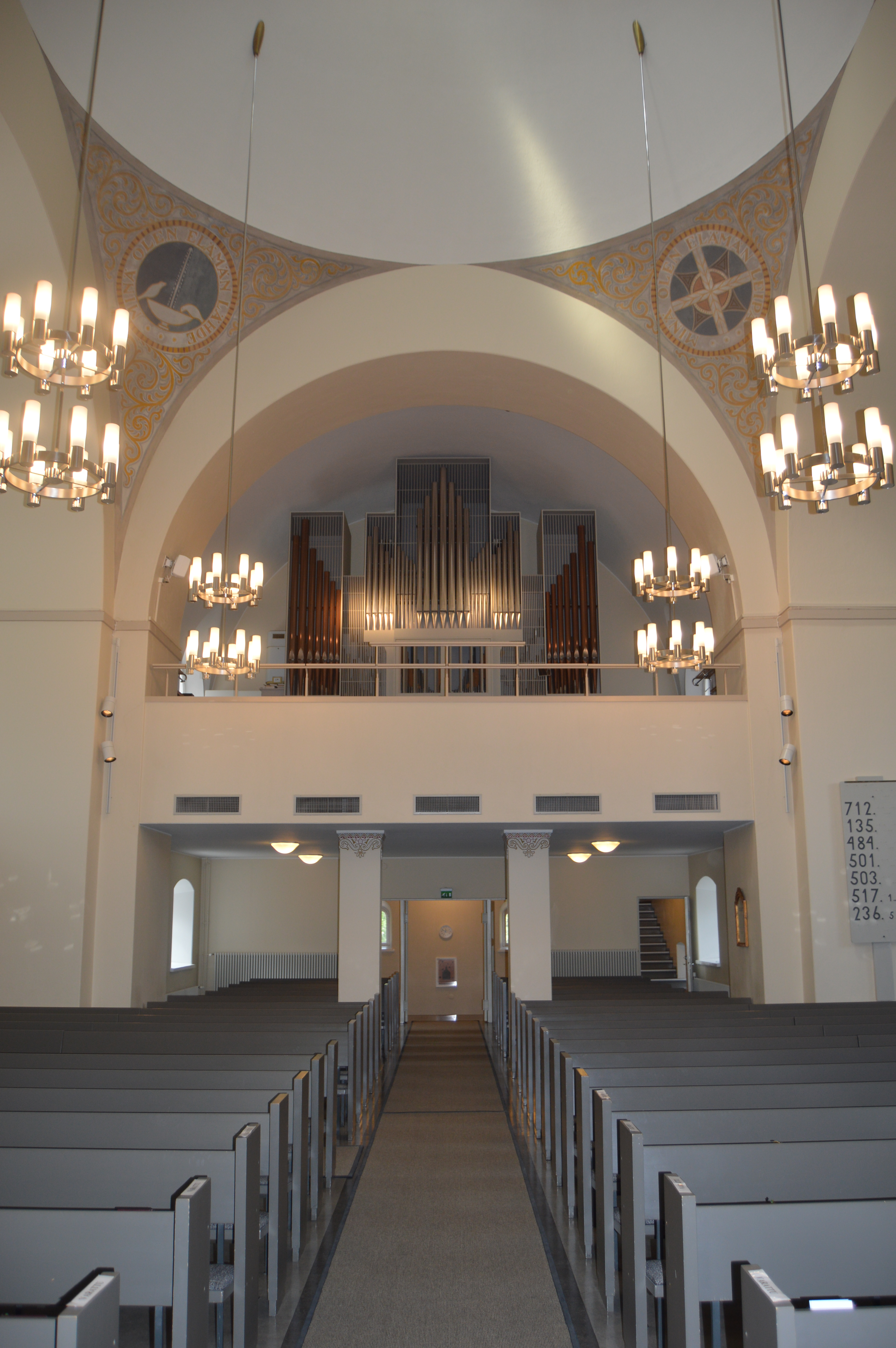 Lappeenrannan kirkko